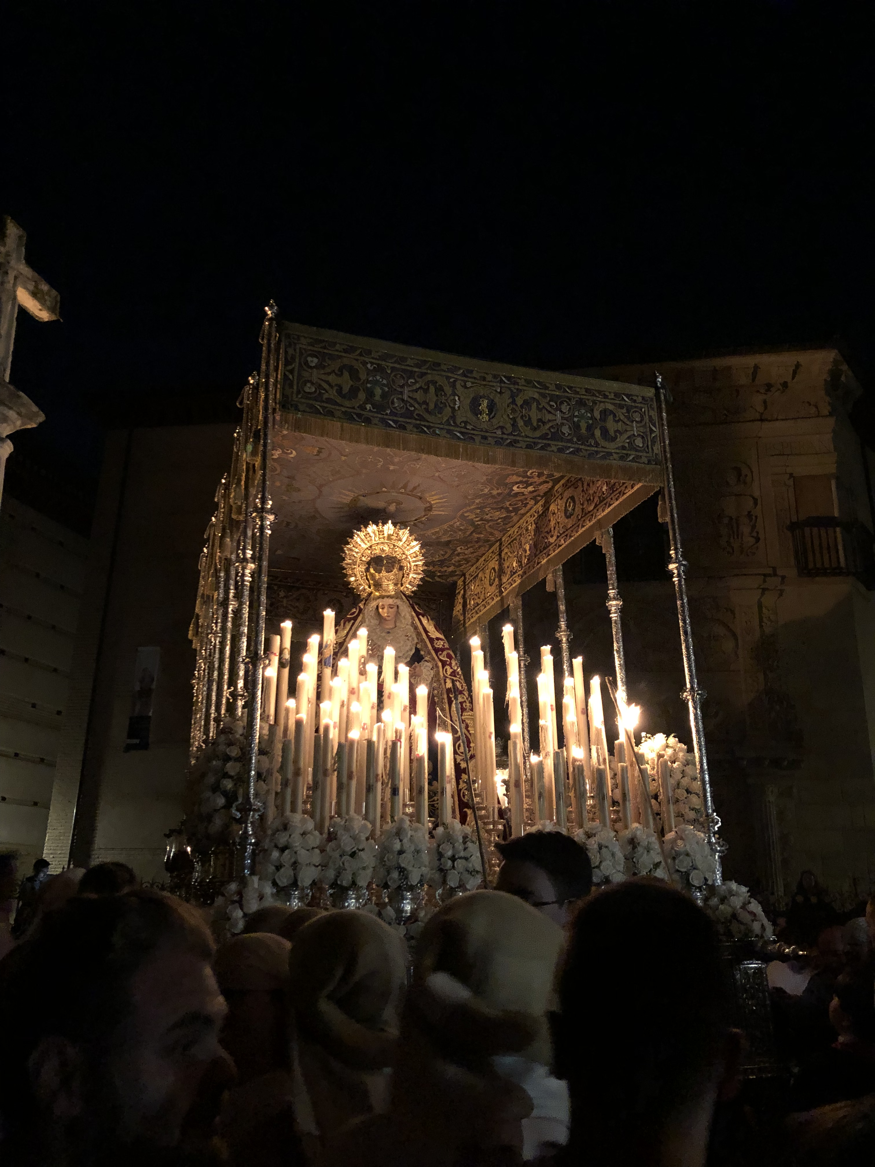 Virgen maravillas granada